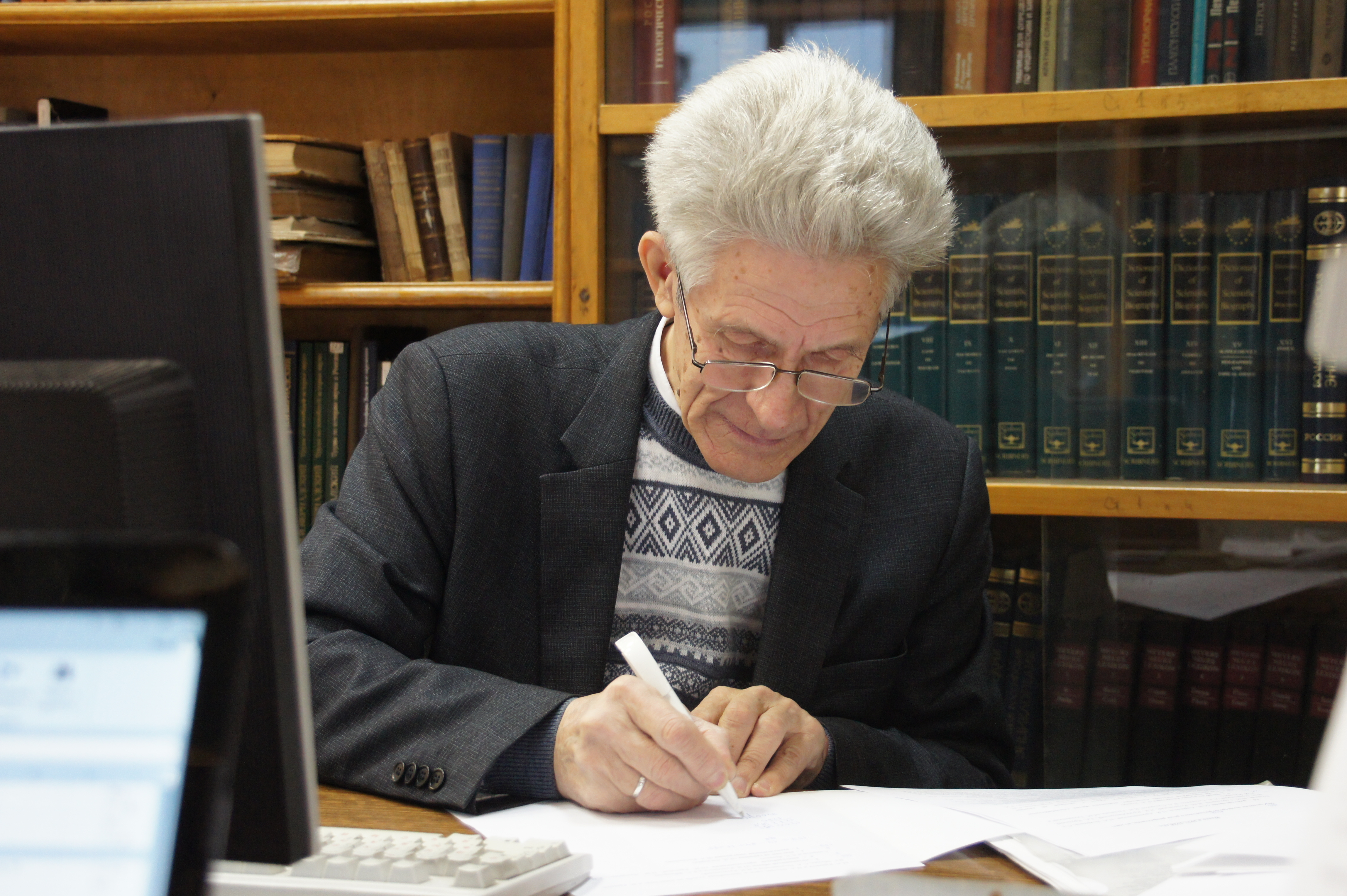 Г. П. Хомизури